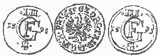 Dawne monety polskie Prus z XVI wieku.